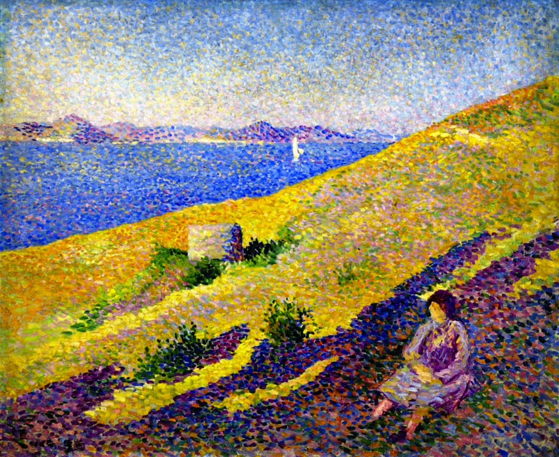 Côte de la Citadelle, huile sur toile 53,5 x 64,8 cm, Saint-Tropez, Musée de l'Annonciade.